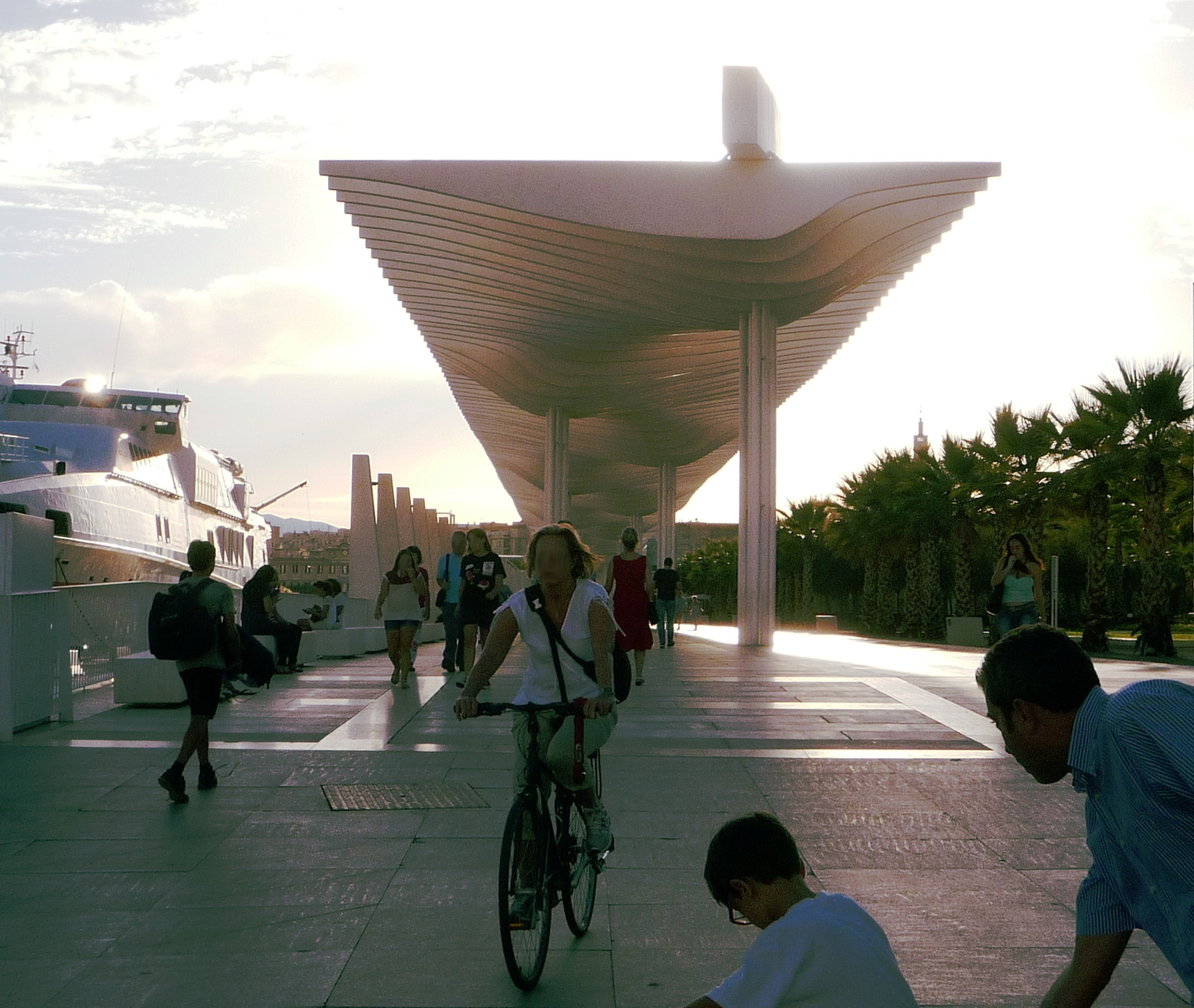 Palmeral de las Sorpresas, Málaga, España.